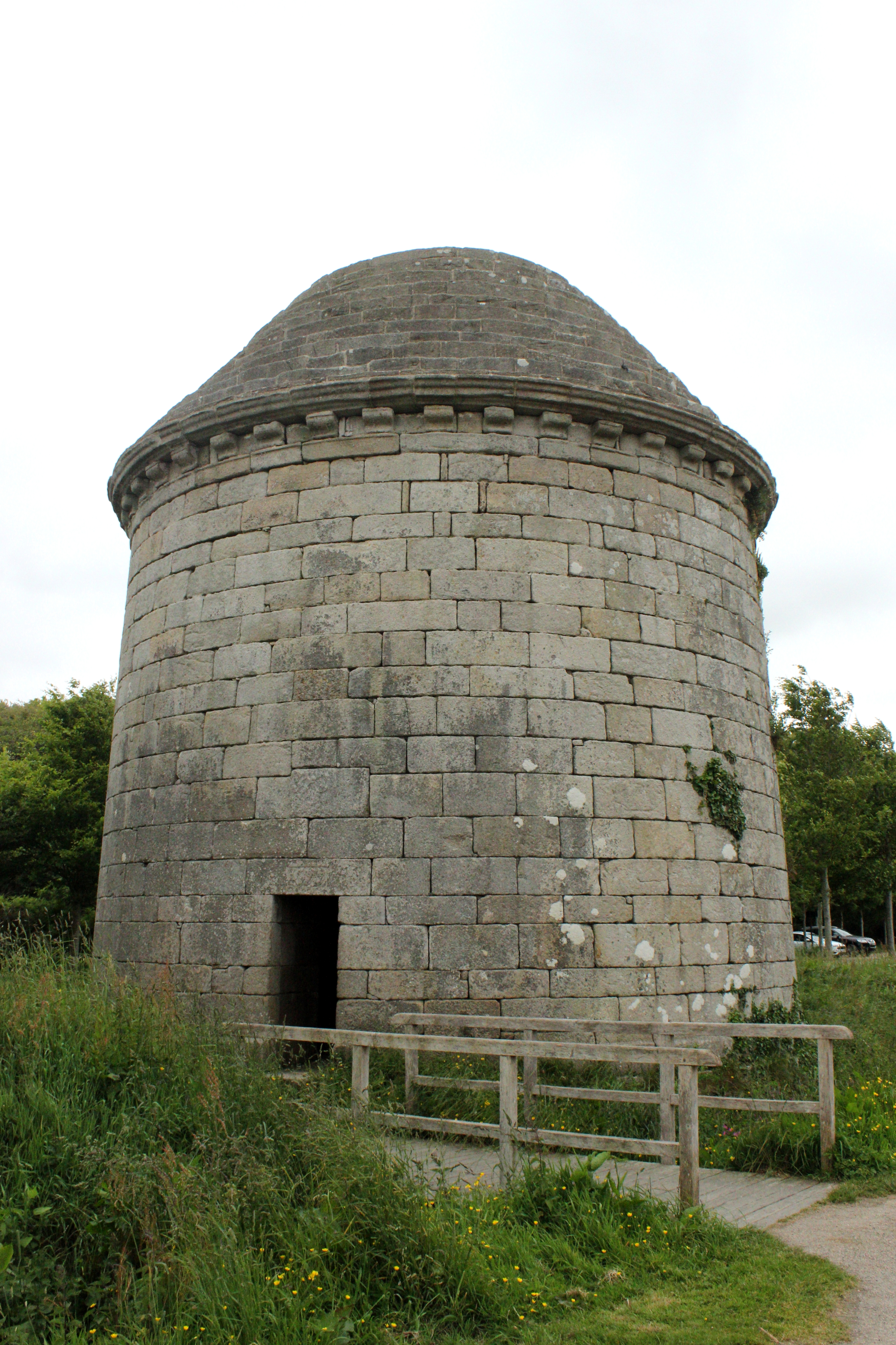 Vue extérieure du colombier du Château de Kerjean